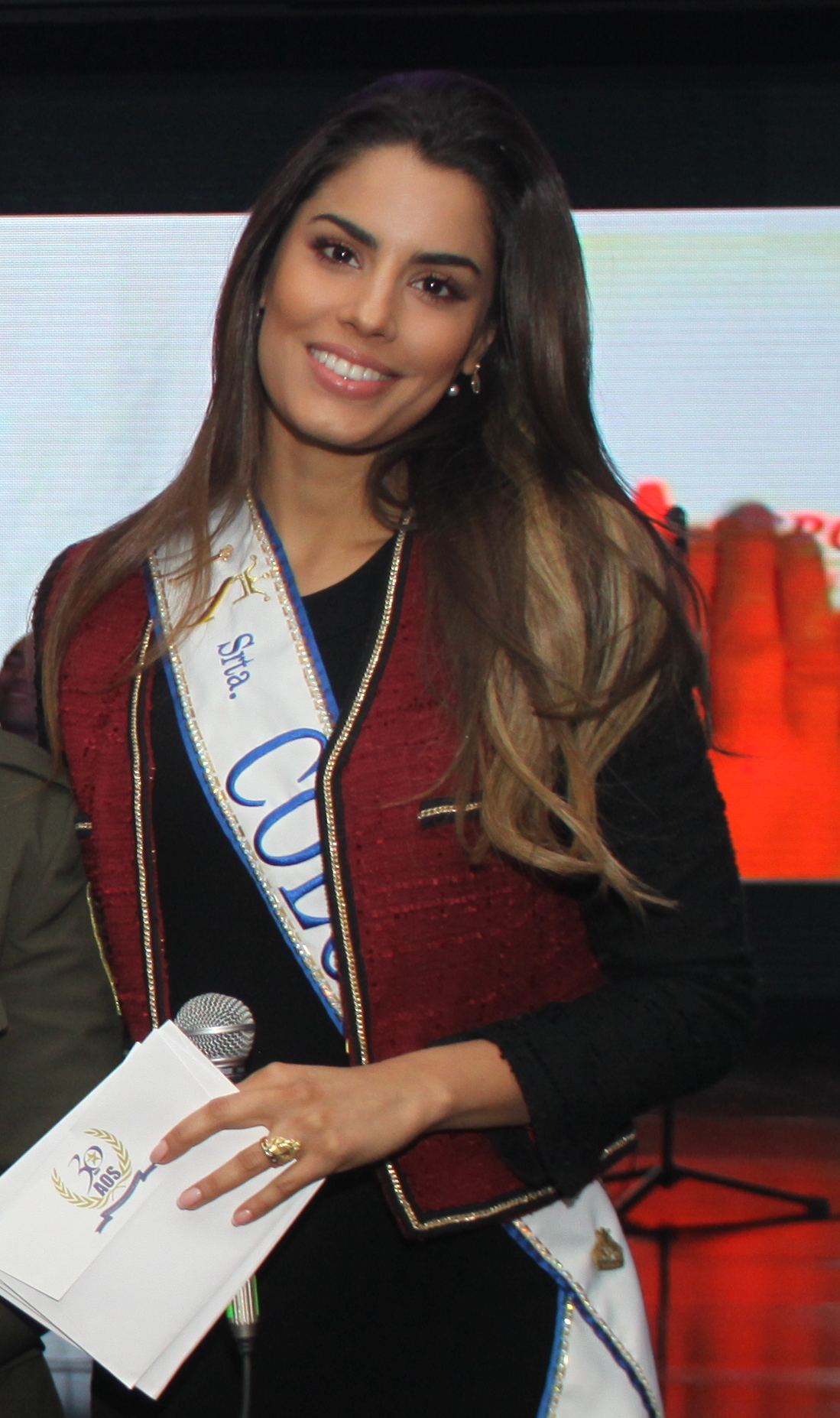 Décimo aniversario de “Café por un Futuro”